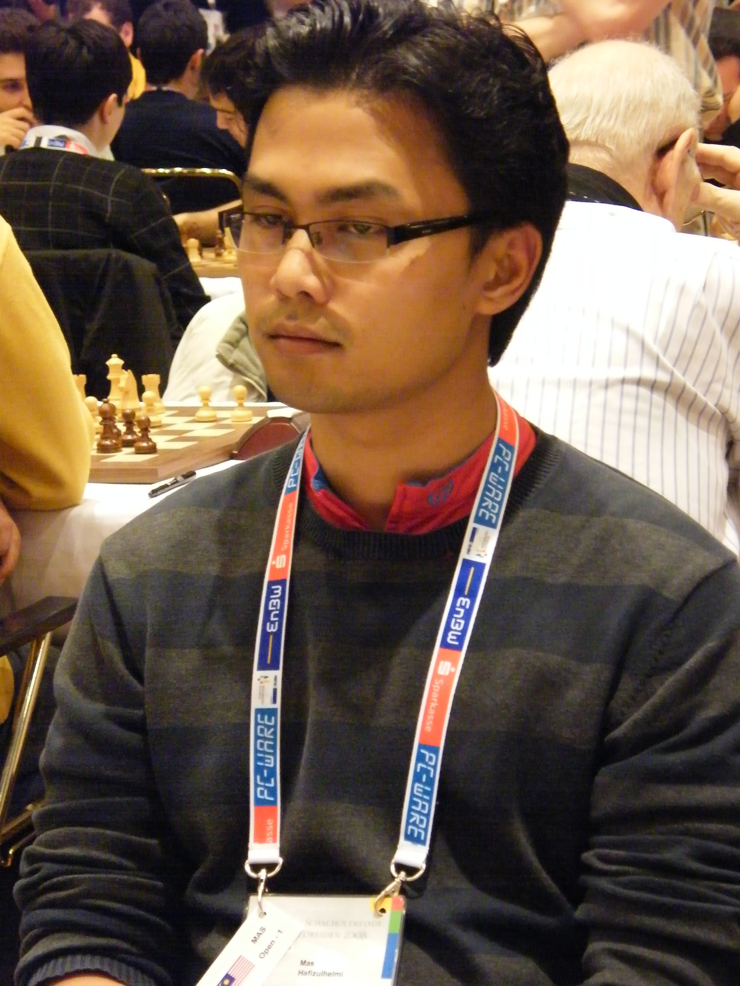 IM Hafizulhelmi Mas bei der Schacholympiade 2008 in Dresden